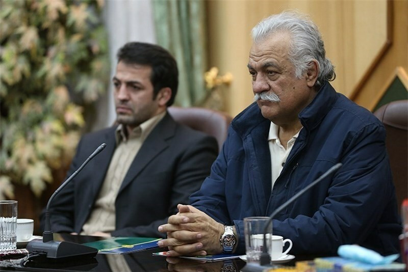 بهرام مشتاقی